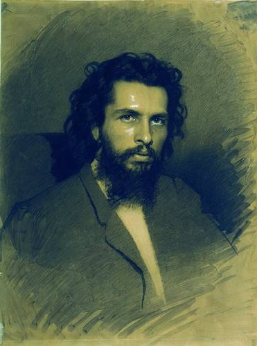 Портрет художника Николая Андреевича Кошелева.